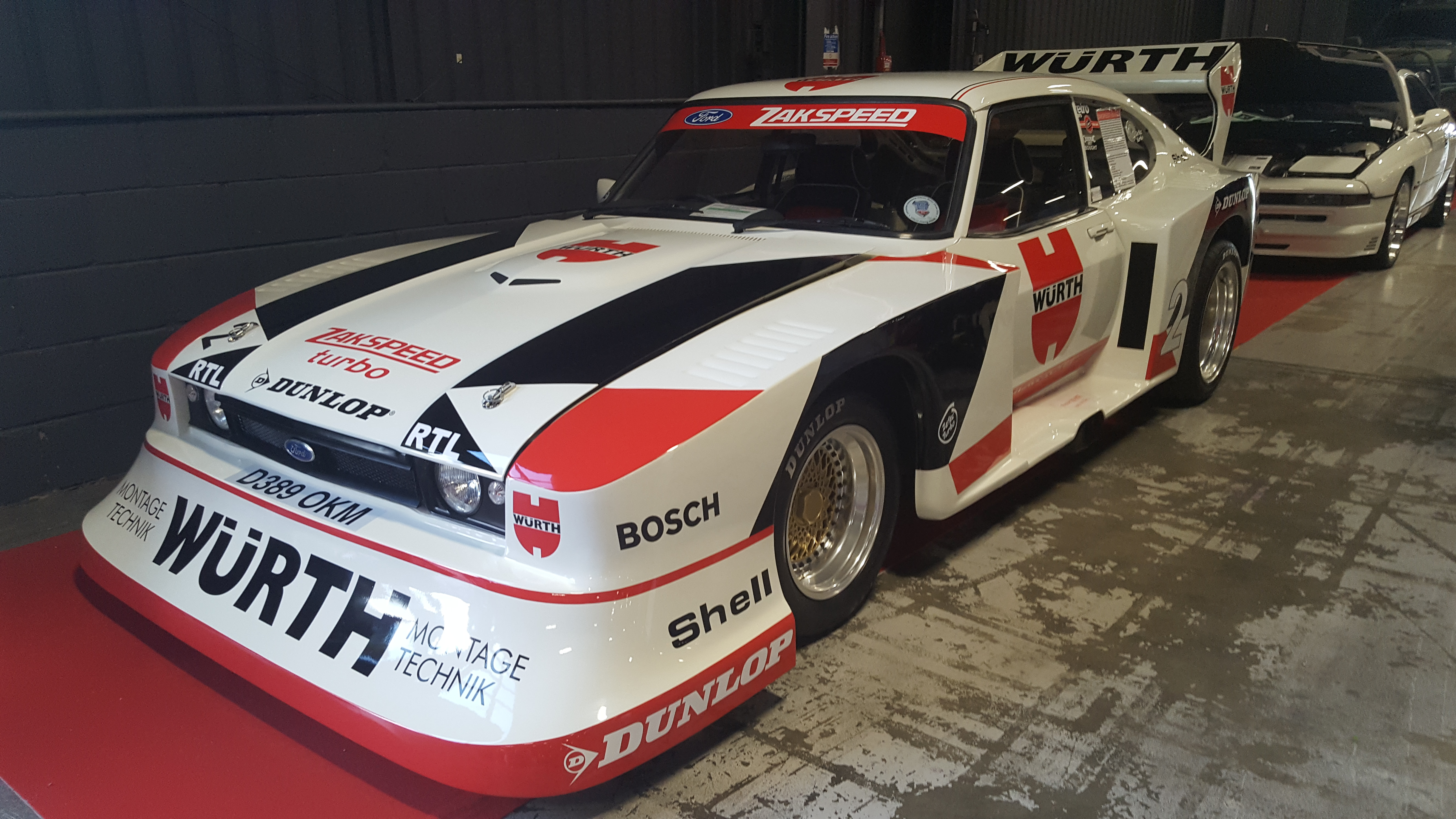 1987 Ford Capri 2.0 Laser